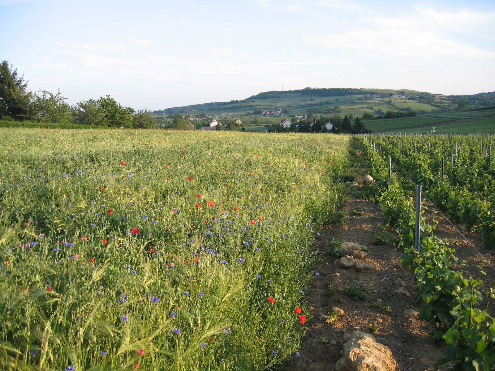 Vignes et céréales à Bissey-sous-Cruchaud (Saône-et-Loire, région Bourgogne)